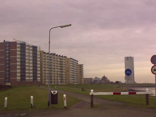 gedeelte van de terneuzense skyline, met waterfront 'eigen werk'